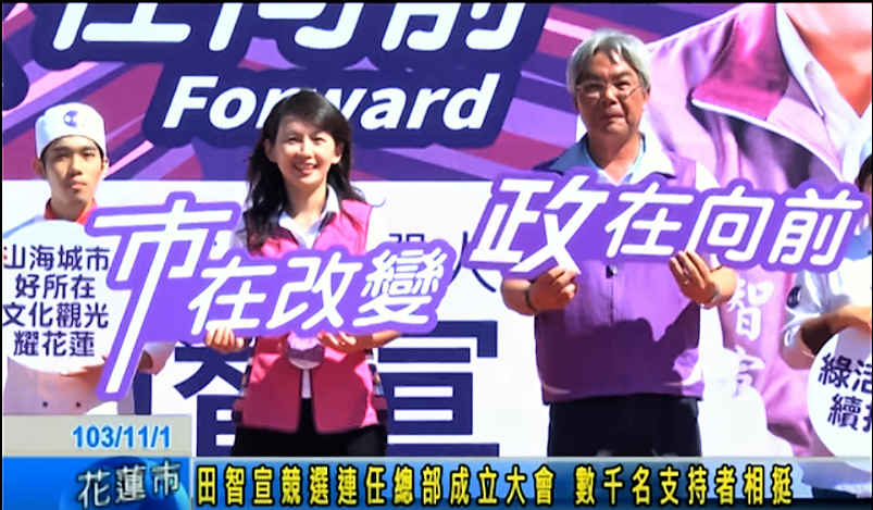 花蓮市長田智宣競選連任總部成立大會 數千名支持者相挺 "市在改變 政在向前"